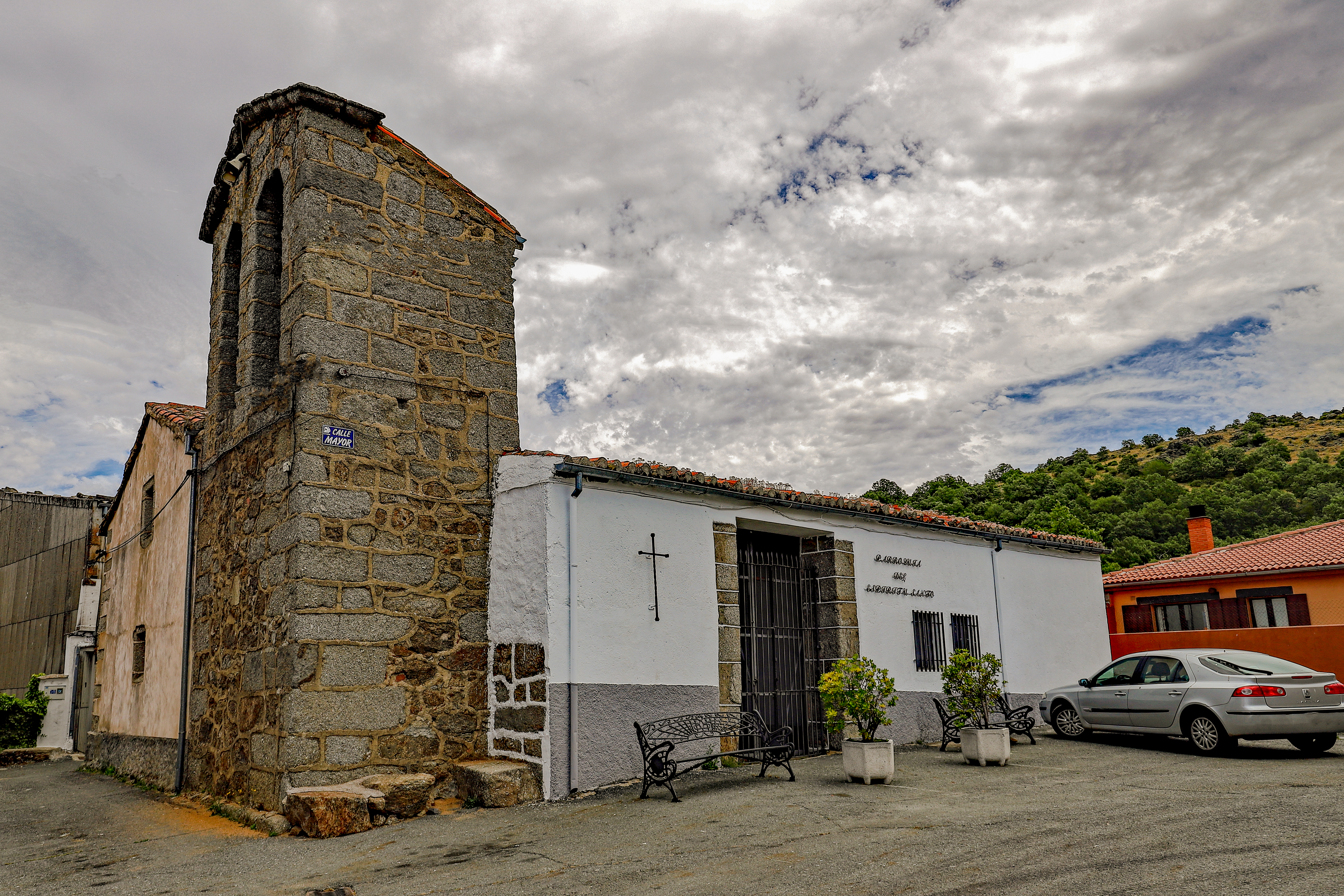 La Hoya es un municipio de la comarca Sierra de Béjar, en la provincia de Salamanca.